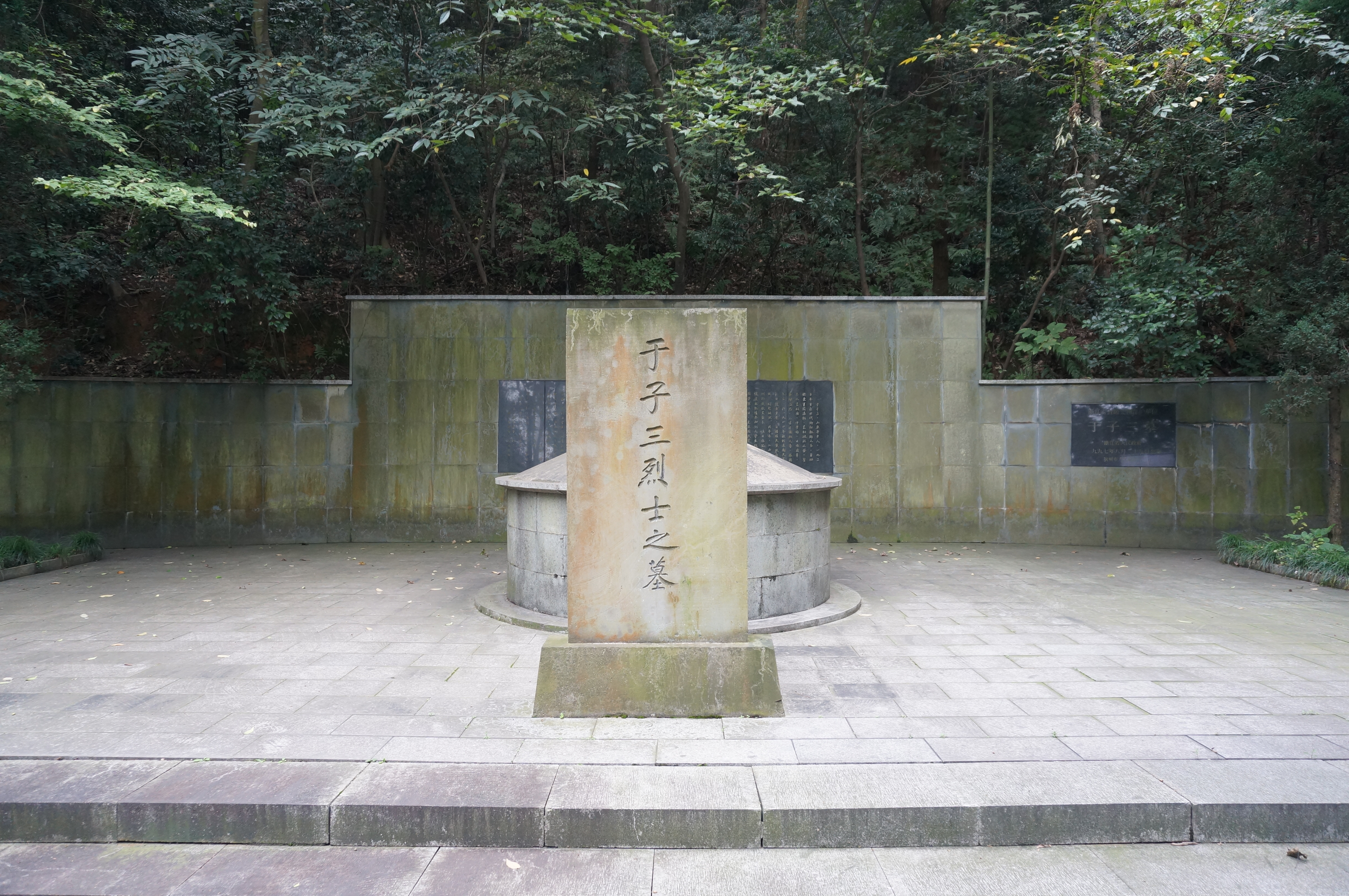 于子三墓，正面。